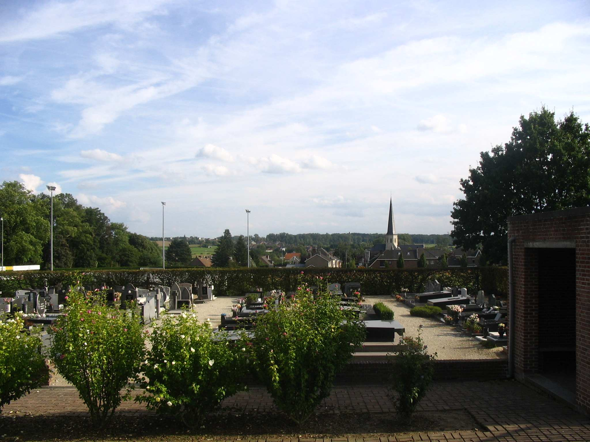 Zicht op de kerk van op het kerkhof avn Borsbeke